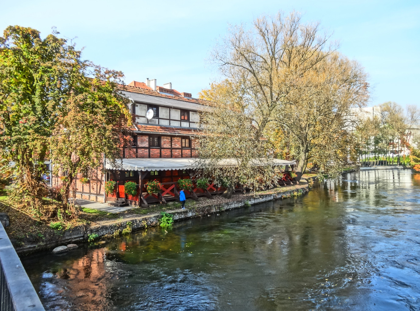 Budynek szachulcowy zwany Karczmą Młyńską zlokalizowany na Wyspie Młyńskiej w Bydgoszczy, zbud. około 1835 roku